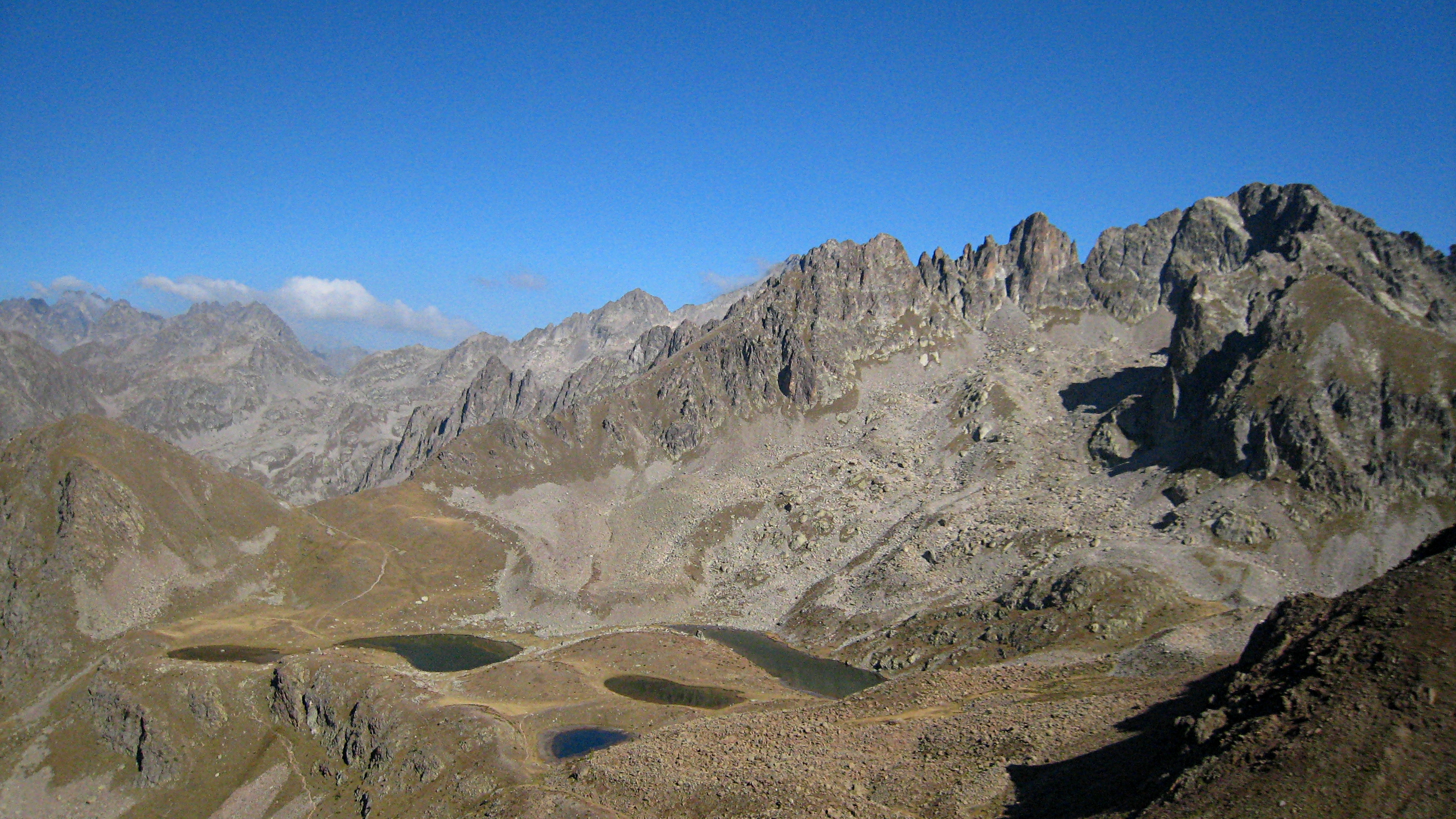 Lacs de Prals, Parc National du Mercantour